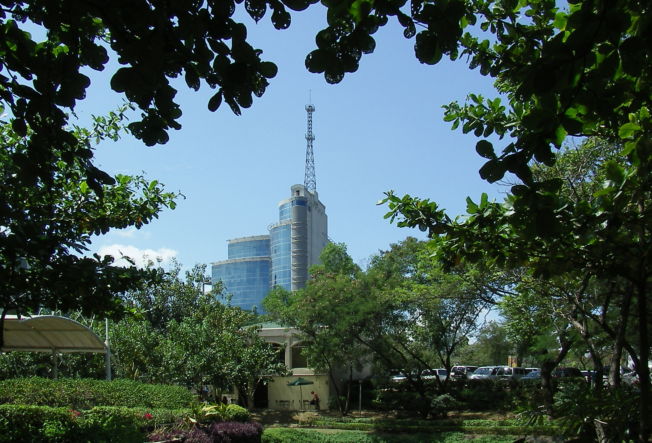 Business Park Cebu-Stadt, April 2006 vom Fotografen Peter Binter als gemeinfrei erklärt